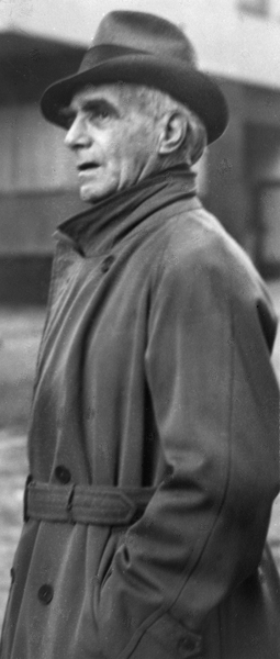 portrett, mann, billedhugger, stående halvfigur, halvprofil.